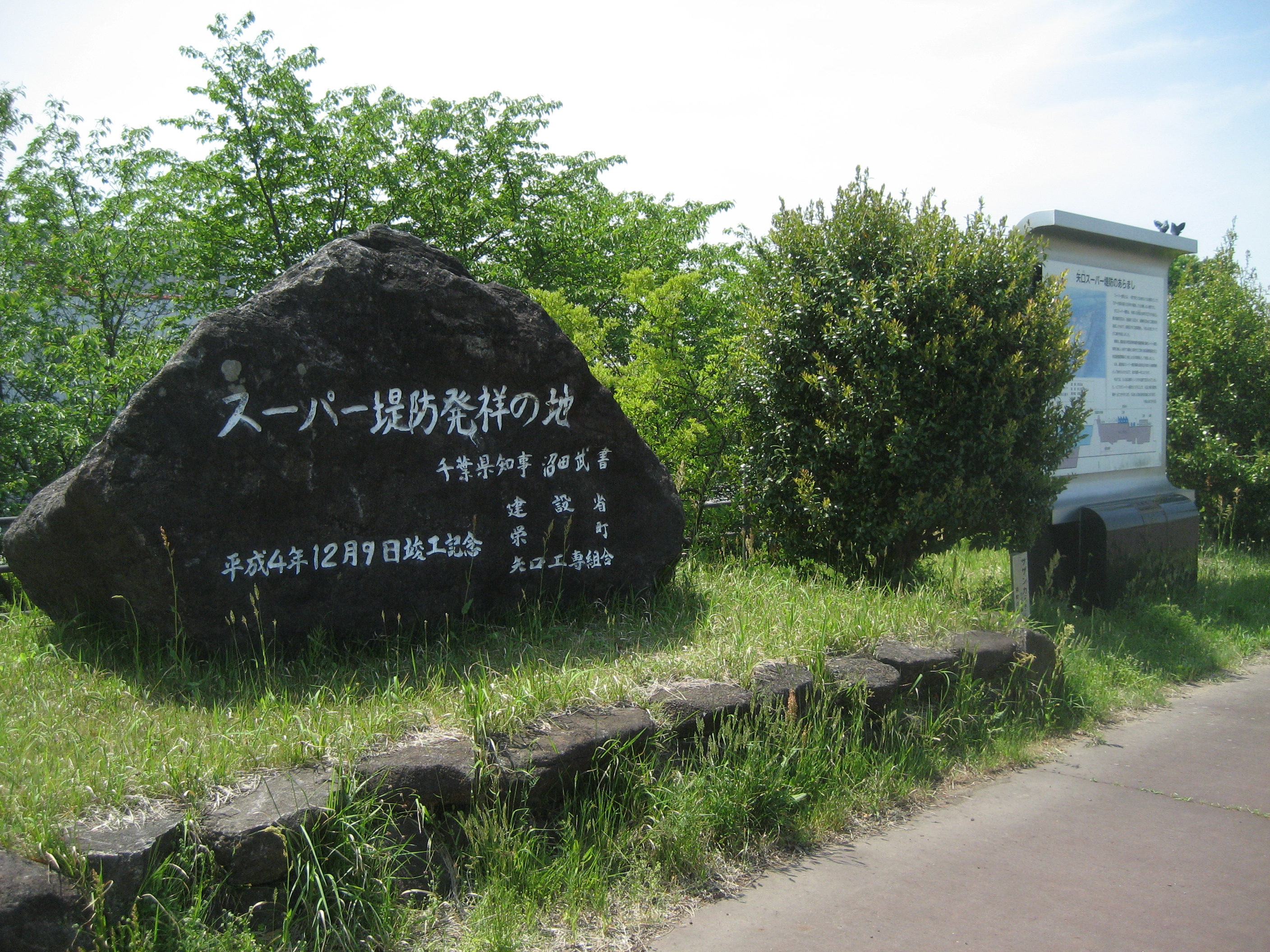 千葉県栄町矢口の利根川堤防に設置されているスーパー堤防発祥の地の碑と事業説明板